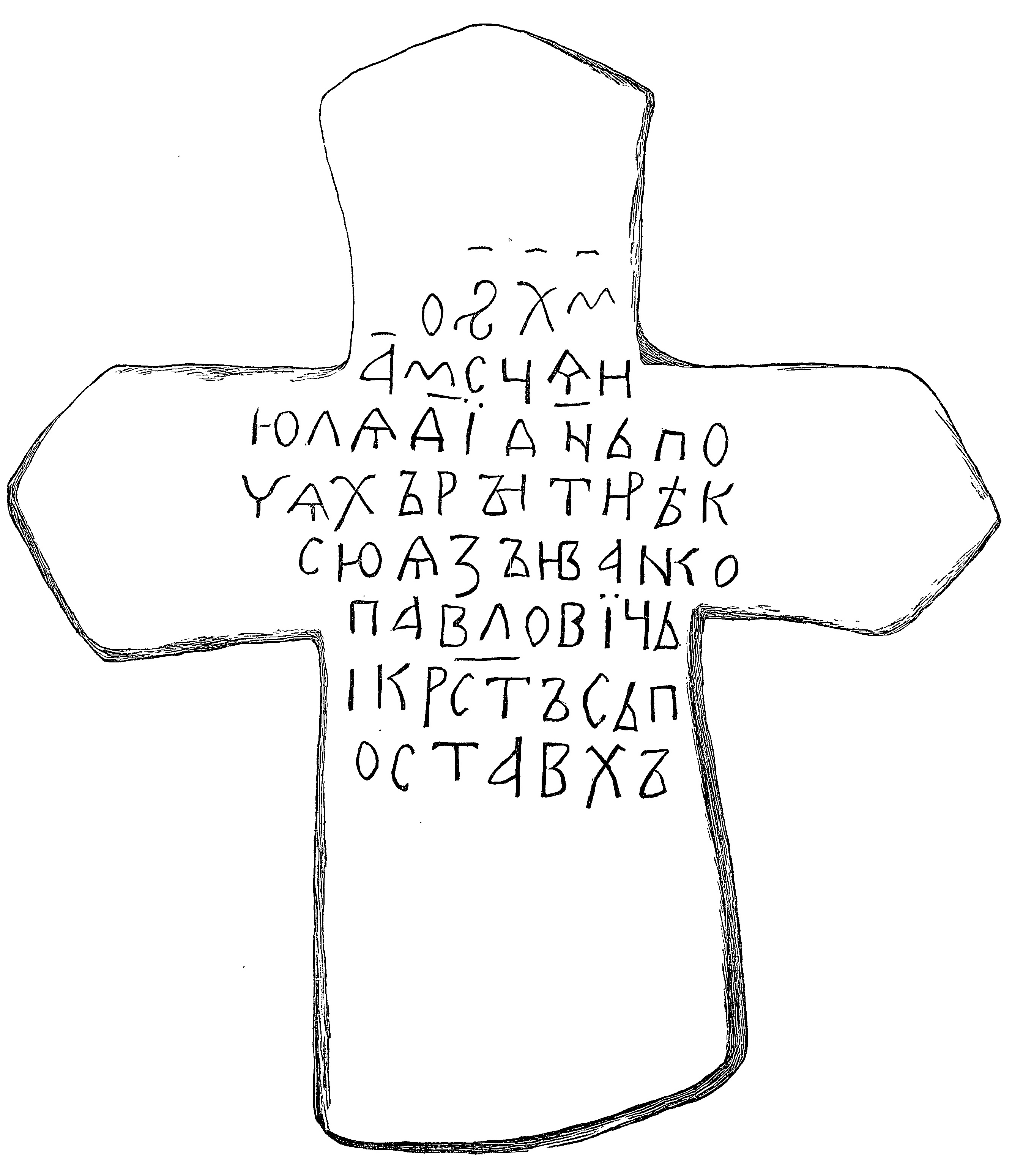 Надпись стерженского креста